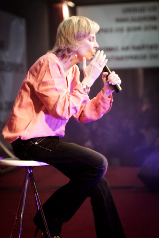 Ludmila Ferber em 2012 durante um show